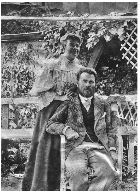 Егор Егорович Лазарев (псевдоним Бровинский; 12 апреля 1855, Самарская губерния — 23 сентября 1937, Прага) — народник, правый эсер, делегат Всероссийского Учредительного собрания, министр просвещения КОМУЧа, политэмигрант, редактор, автор мемуаров.